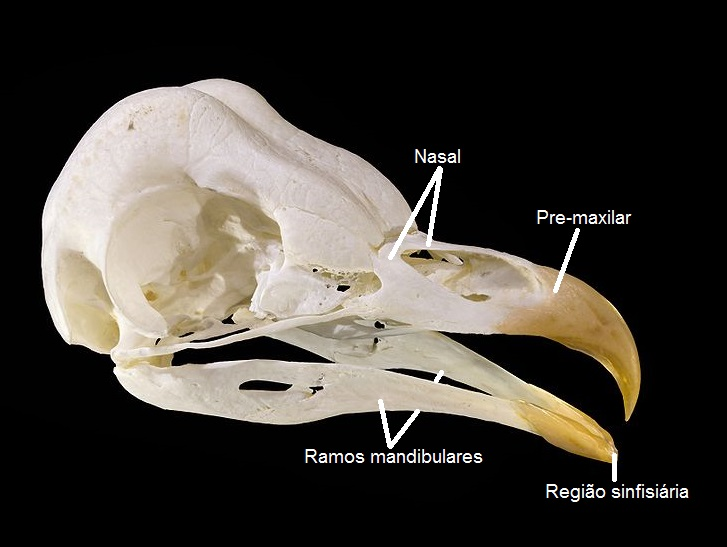 Nesta imagem estão esquematizados: os principais ossos constituintes da maxila superior dos bicos (nasal e pré-maxilar), os ramos mandibulares e a região de fusão desses ramos, a região sinfisiária.